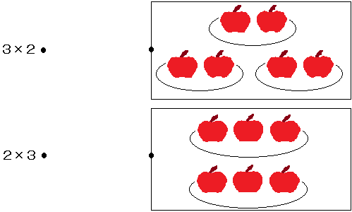 問題のある算数教育・「式とあう絵を選んで、線で結びなさい。」